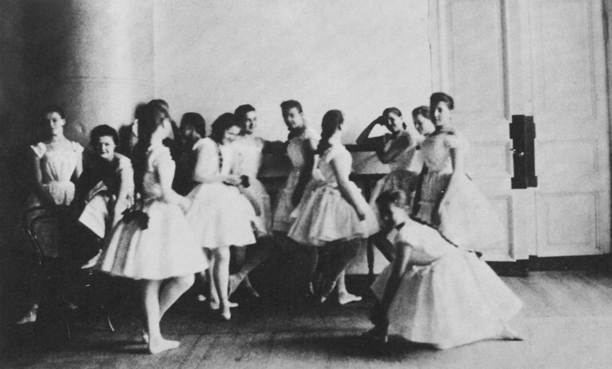 Russischer Photograph: Eine Klasse der kaiserlichen Ballettschule, in der Tänzerinnen für das Mariinskij-(jetzt Kirow-) Theater ausgebildet wurden [1]